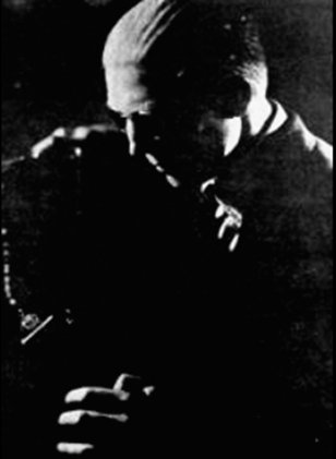 Payo Solá, Argentina. Folk. Music